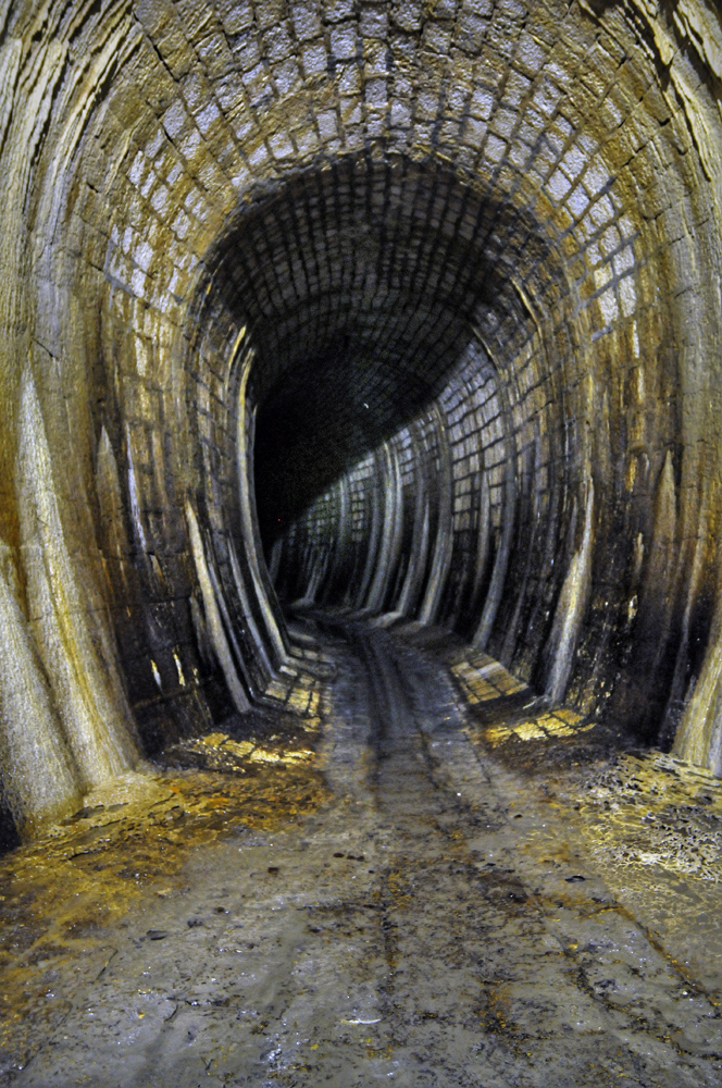 Imbocco dell'emissario